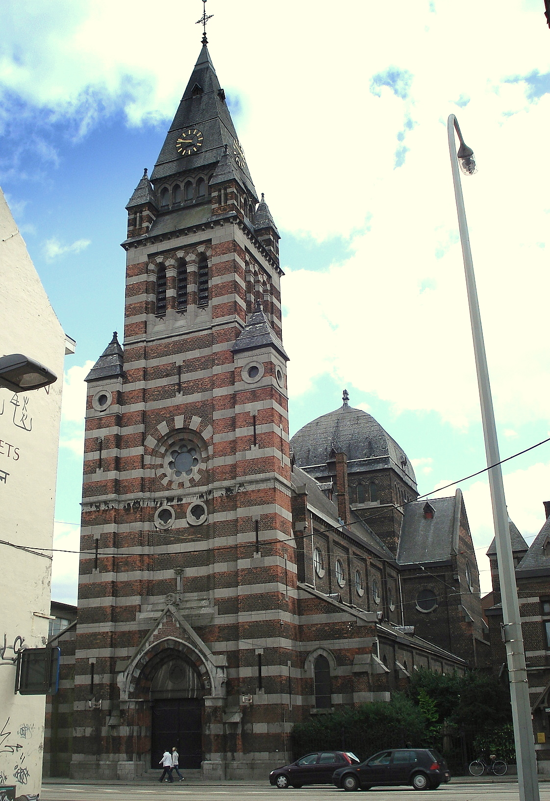 Antwerpen, district Merksem. Eclectische Sint-Franciscuskerk, aan de Bredabaan. Ontwerp van arch. Henri Blomme (1893-1896). Vgl. Inventaris Onroerend Erfgoed.